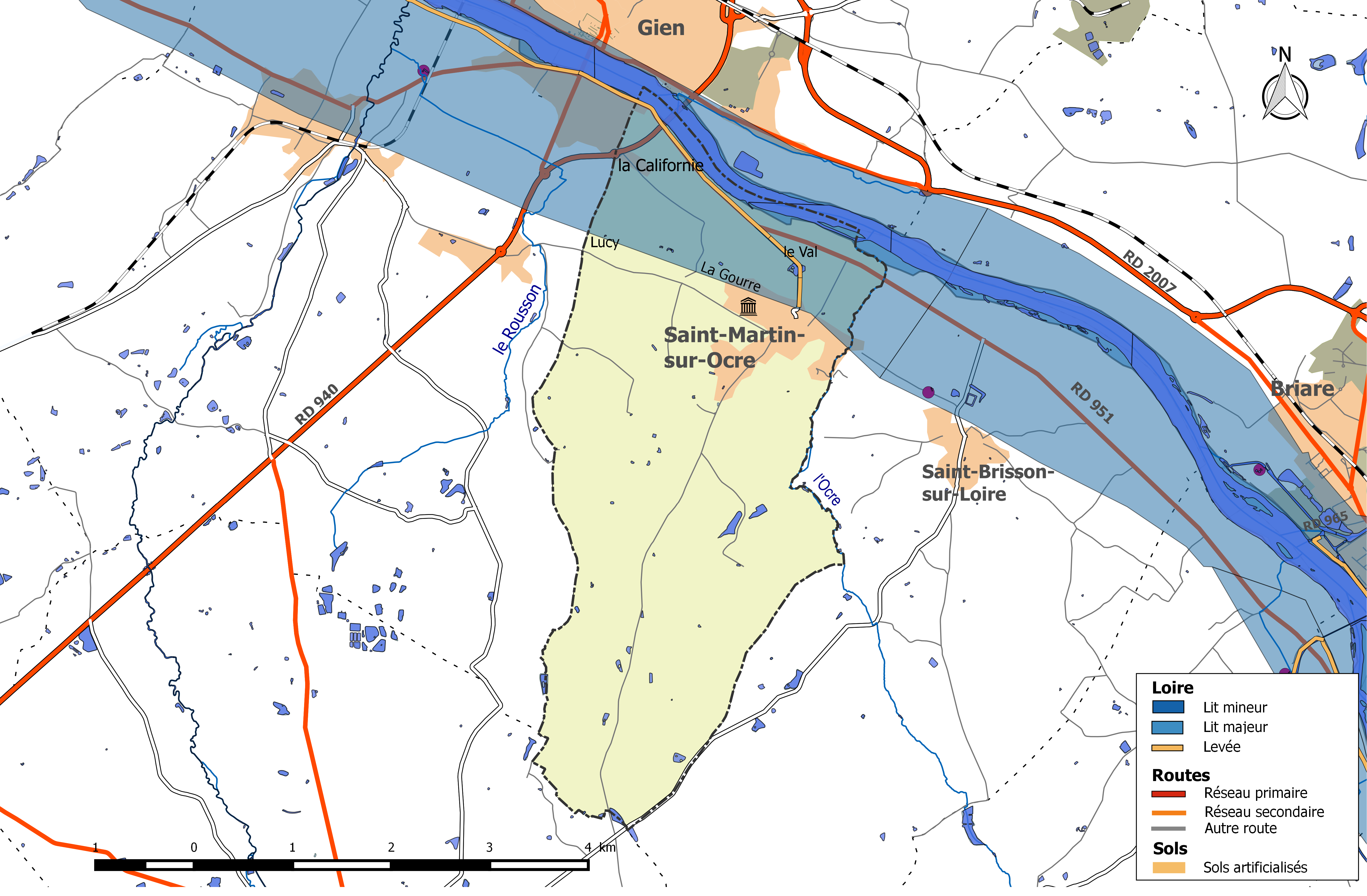 Zone inondable et réseaux hydrographique et routier de la commune de Saint-Martin-sur-Ocre